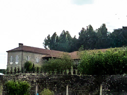 pazo de toixeriña en galicia